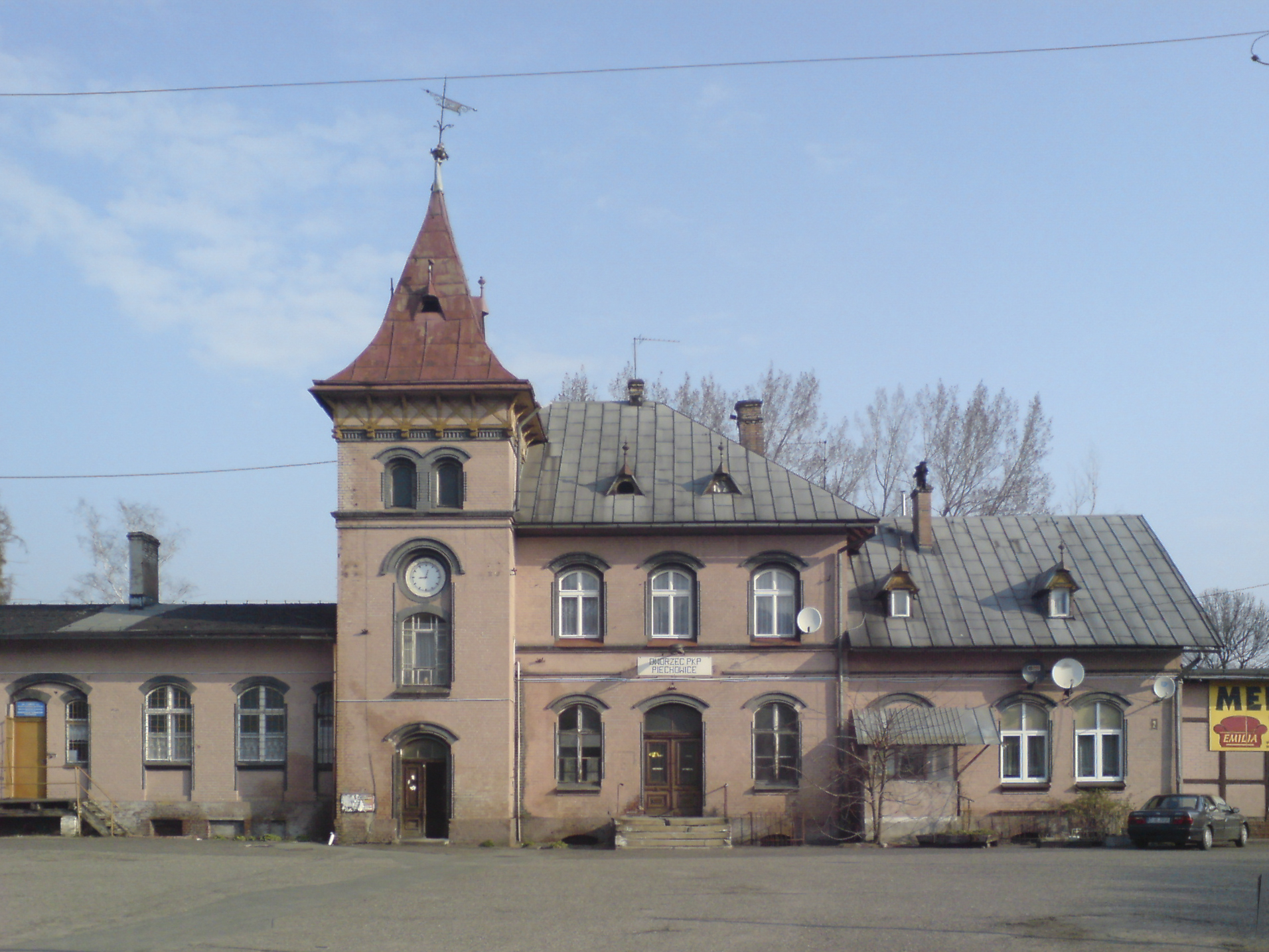 Dworzec kolejowy w Piechowicach, powiat jeleniogórski